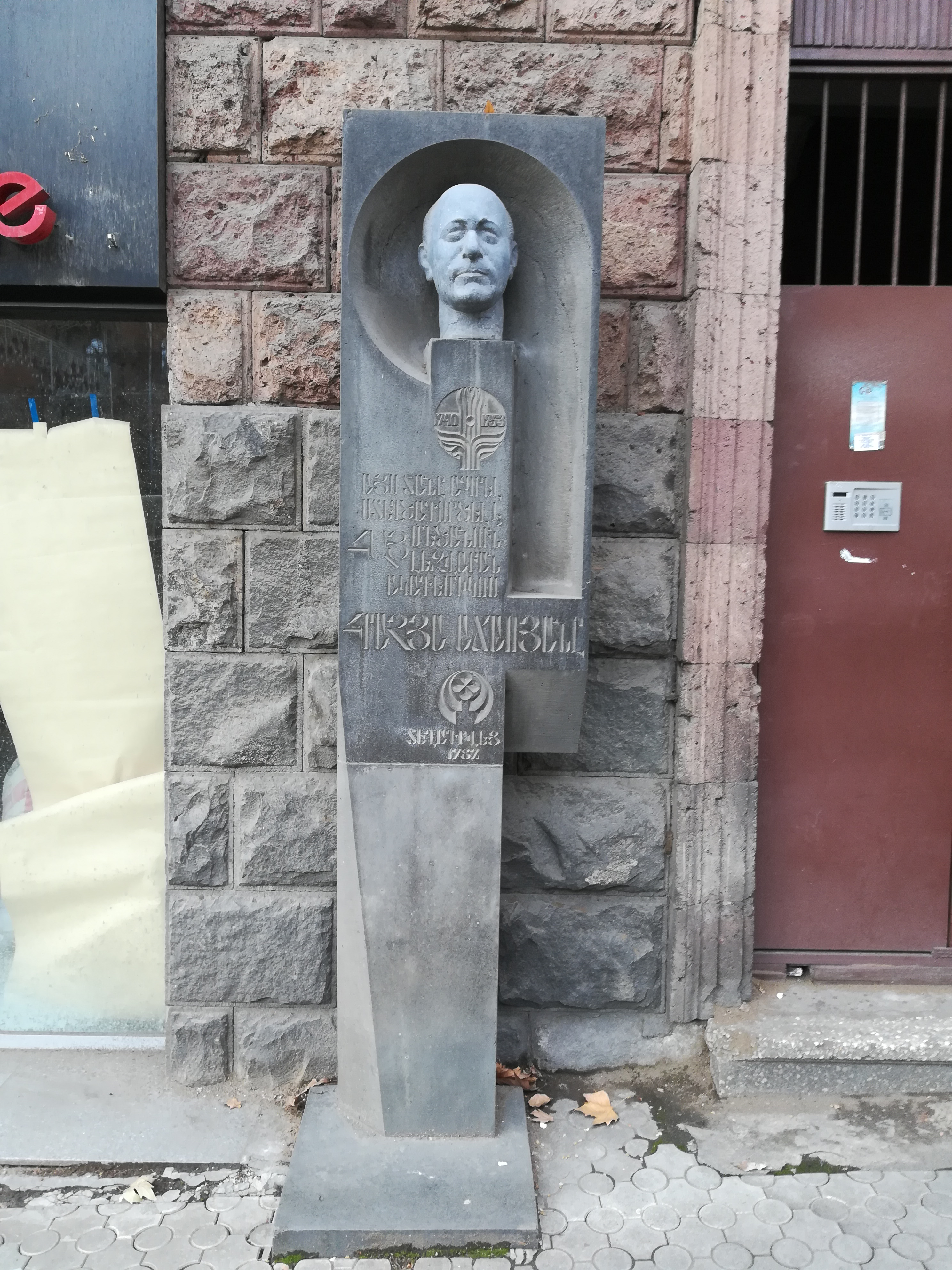 Ереван